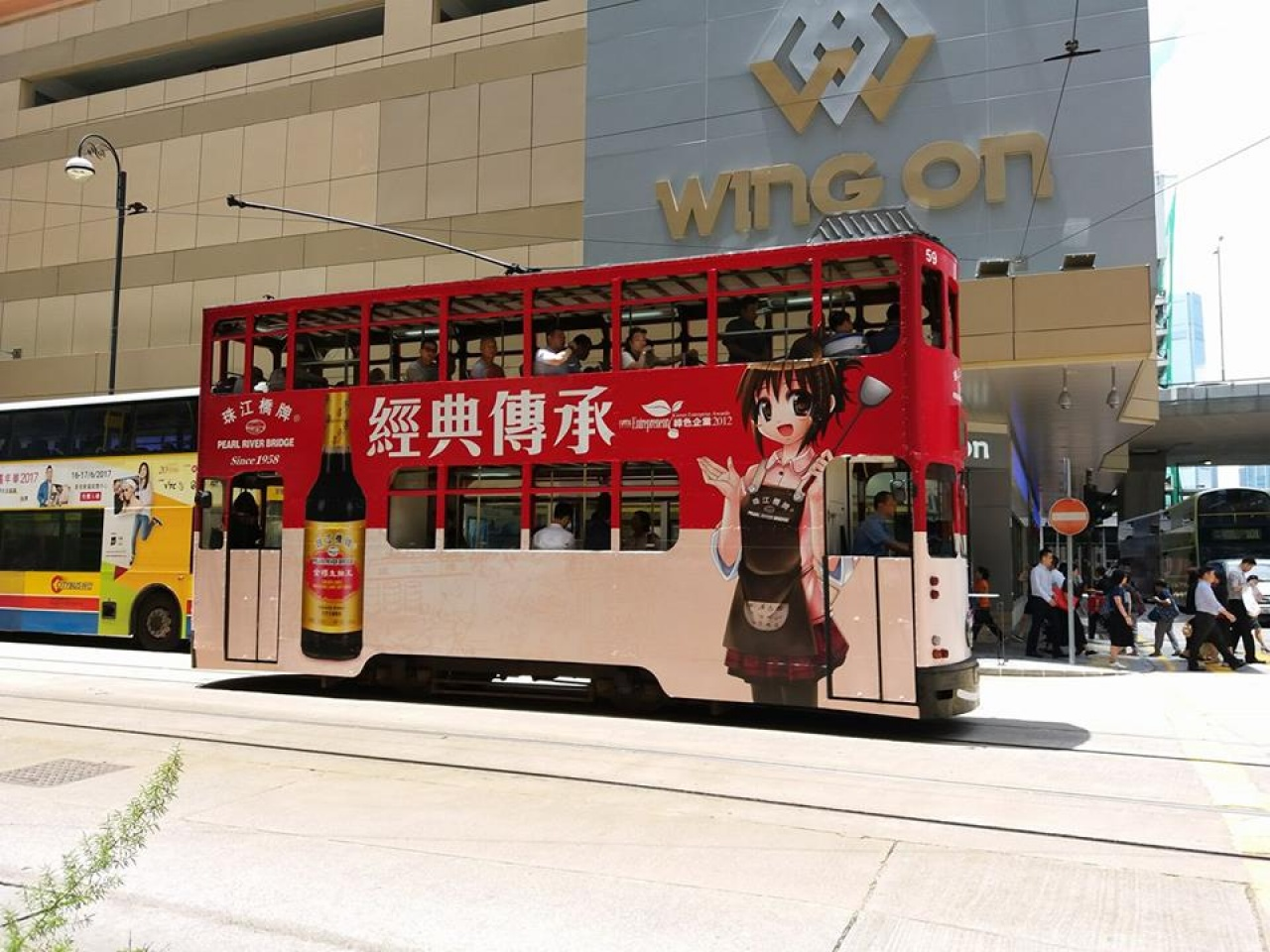 中文（香港）: 香港上環，珠江橋牌廚娘廣告電車。